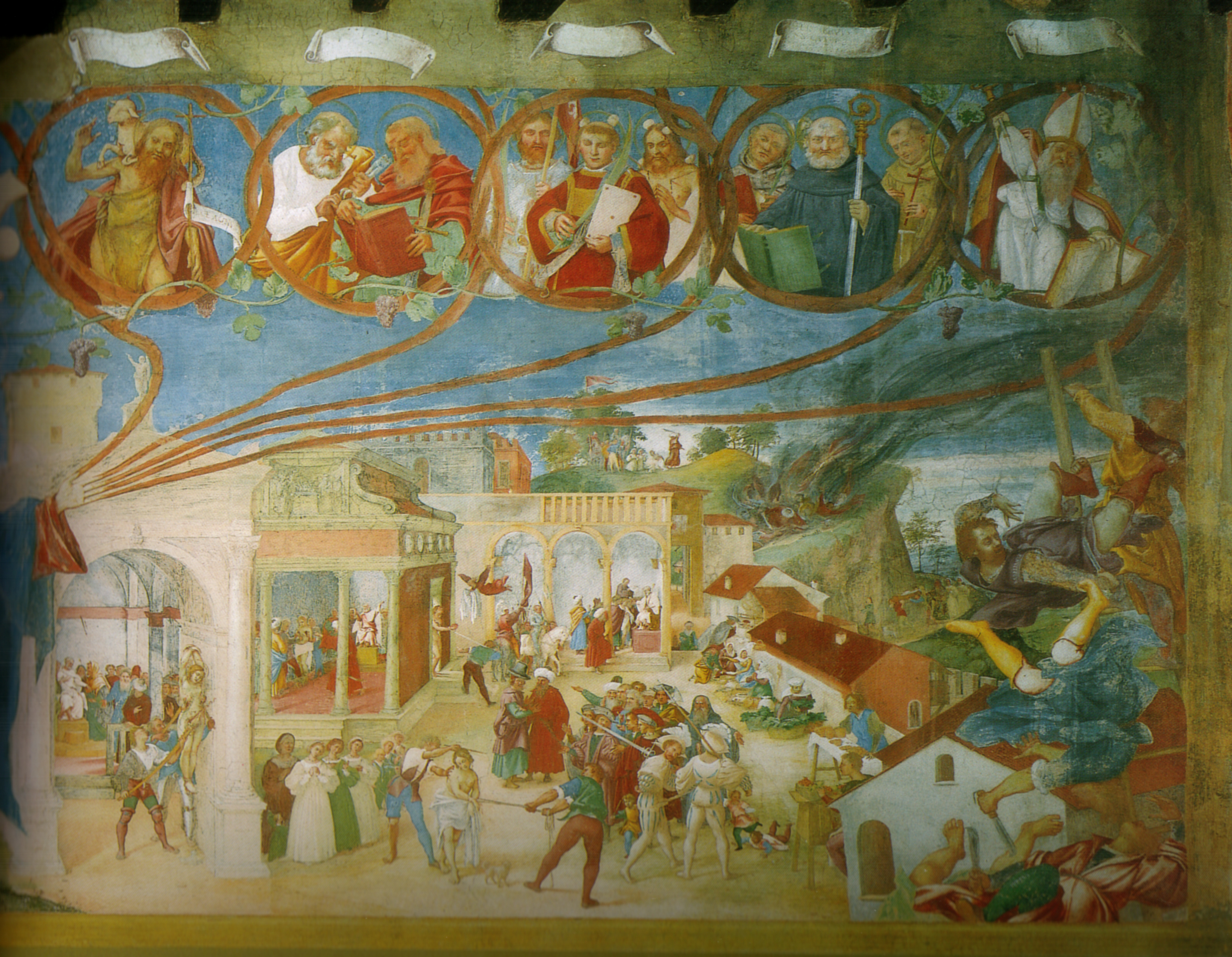 affreschi di trescore